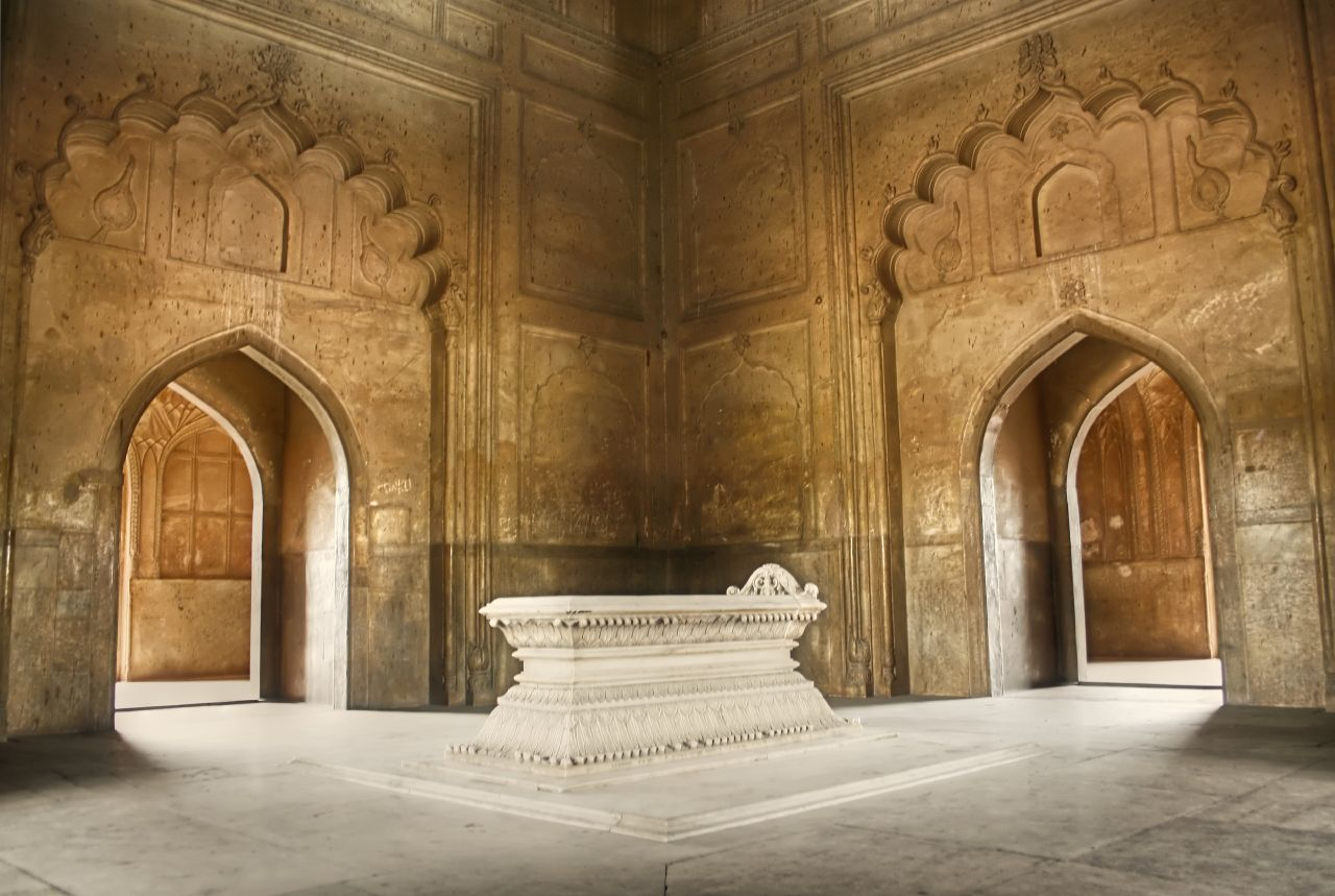 Cenotaph inside Safdarjung Tomb, Delhi.